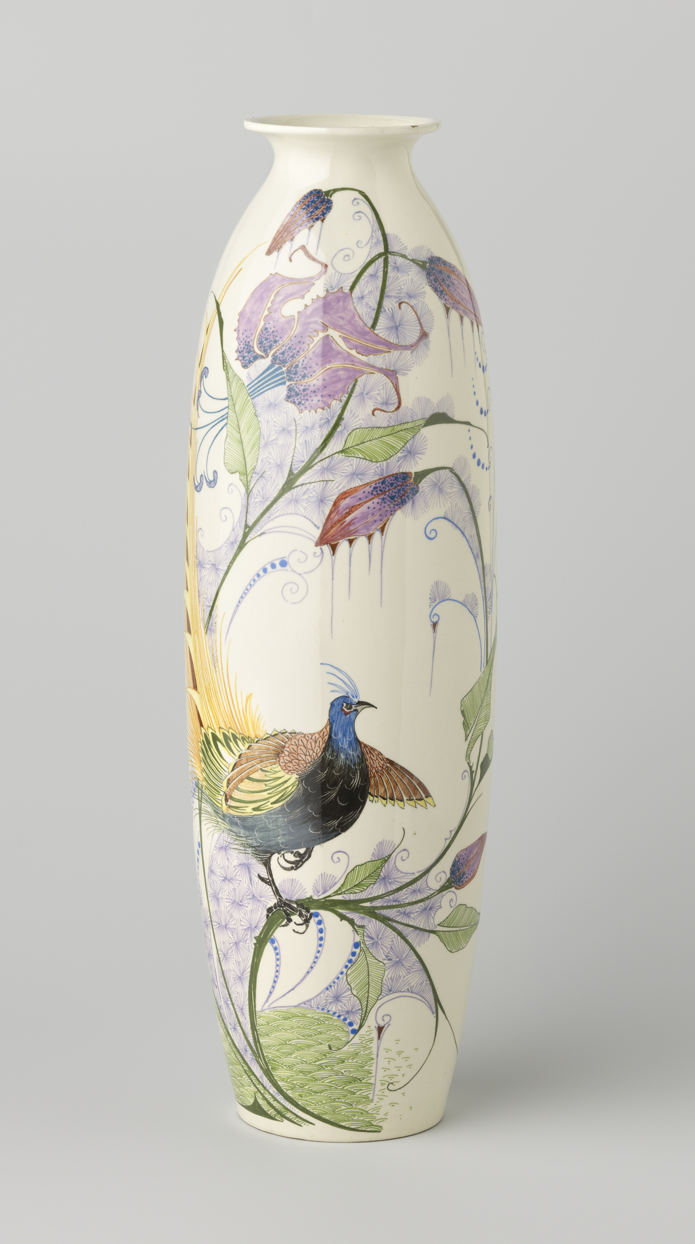 IdentificatieTitel(s): Vaas van aardewerk, beschilderd met een pauw op lelietakkenObjecttype: vaas Objectnummer: BK-1978-30Opschriften / Merken: merk: ‘AMPHORA // HOLLAND. // 15-1. // Ontw. .Th. Verstraaten. (in zwart) en 15 (ingegrift).’Omschrijving: Vaas van aardewerk, beschilderd in blauw, groen, geel, paars, bruin, rood en zwart met een pauw op lelietakken.VervaardigingVervaardiger: ontwerper: Th. Verstraatenvervaardiger: Tegel- en Fayencefabriek AmphoraPlaats vervaardiging: OegstgeestDatering: ca. 1910Materiaal: aardewerk Techniek: schildertechniekAfmetingen: h 46,0 cm. × d 14,2 cm. Verwerving en rechtenVerwerving: aankoop 1978Copyright: Publiek domein